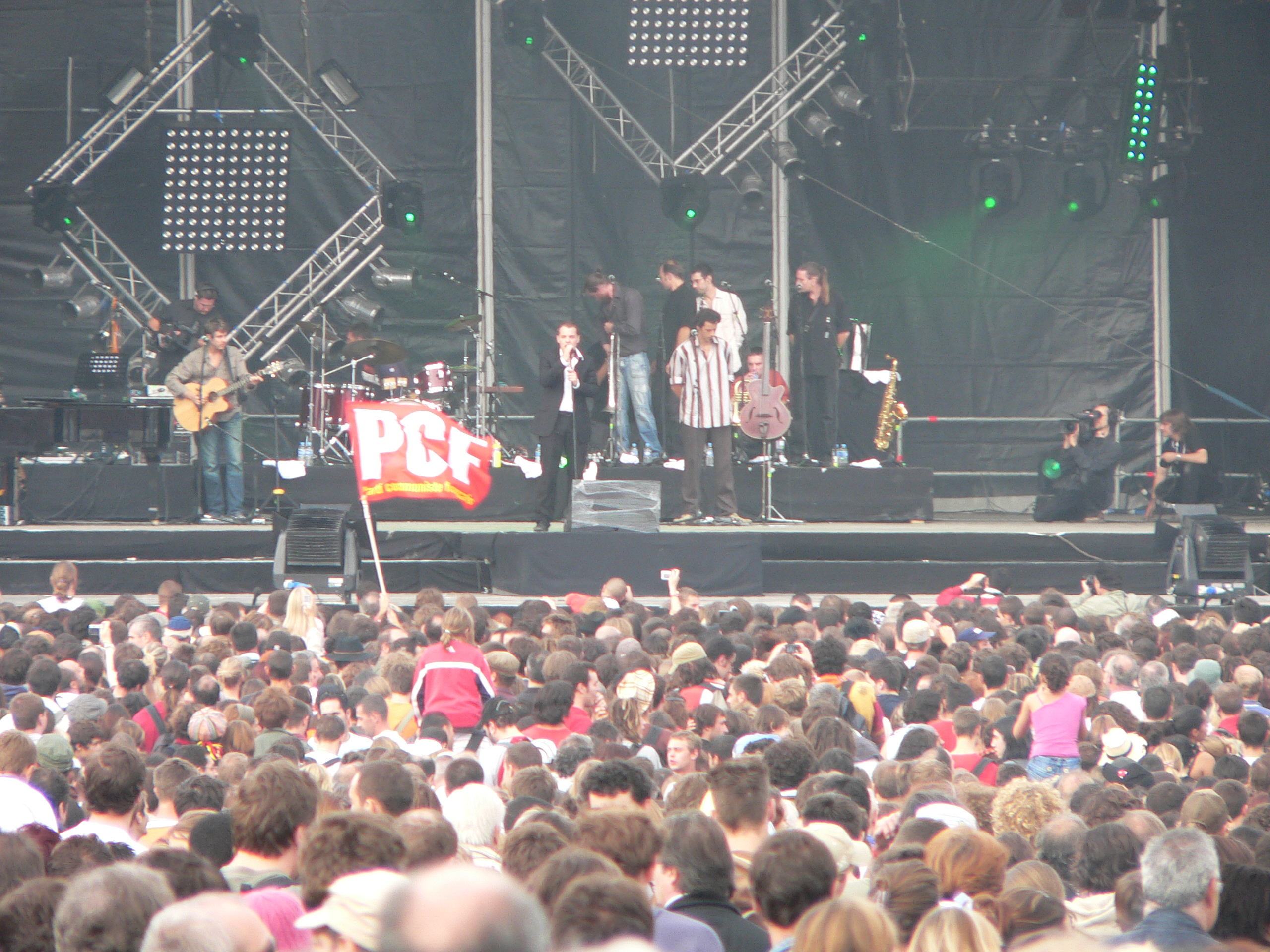 Fête de l’Humanité, 15 July 2006-17 July 2006